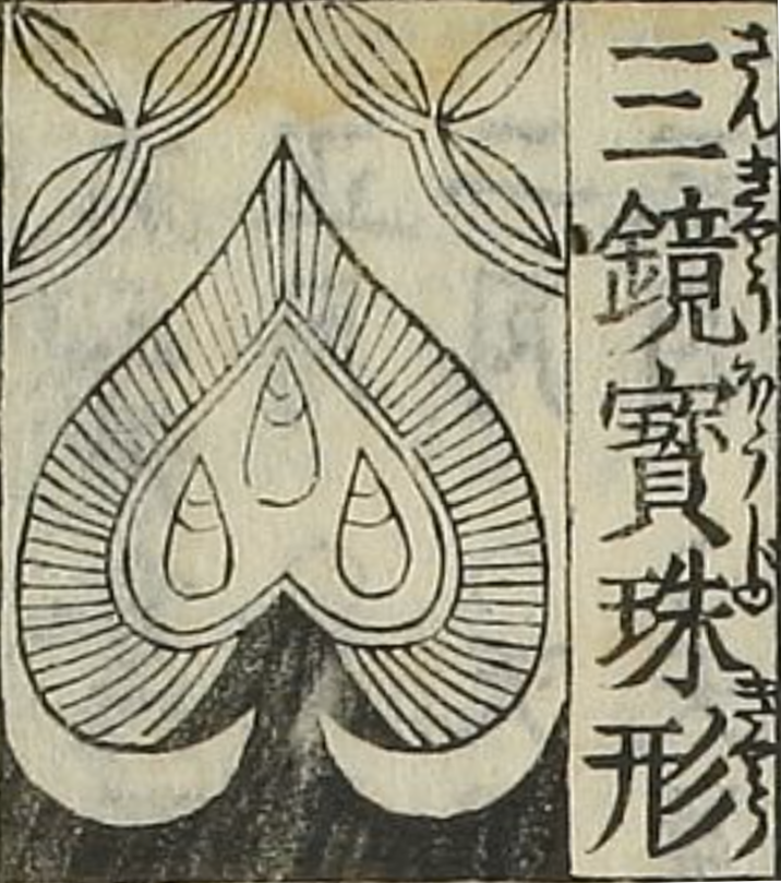 粵語: 取自曆畧書，東都劉卜子，日本寛永十二年九月（即一八〇〇年）版本。